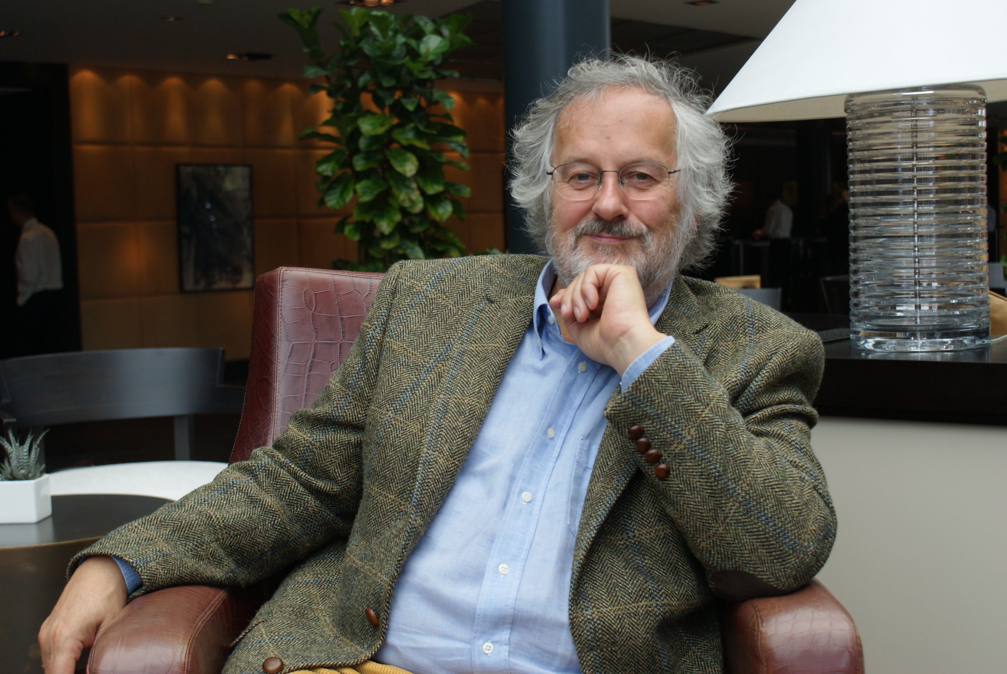 Christian Nürnberger, Publizist, Ehemann der Fernsehjournalistin Petra Gerster, bei einem Interview mit dem Christlichen Medienmagazin pro am 16. September 2010